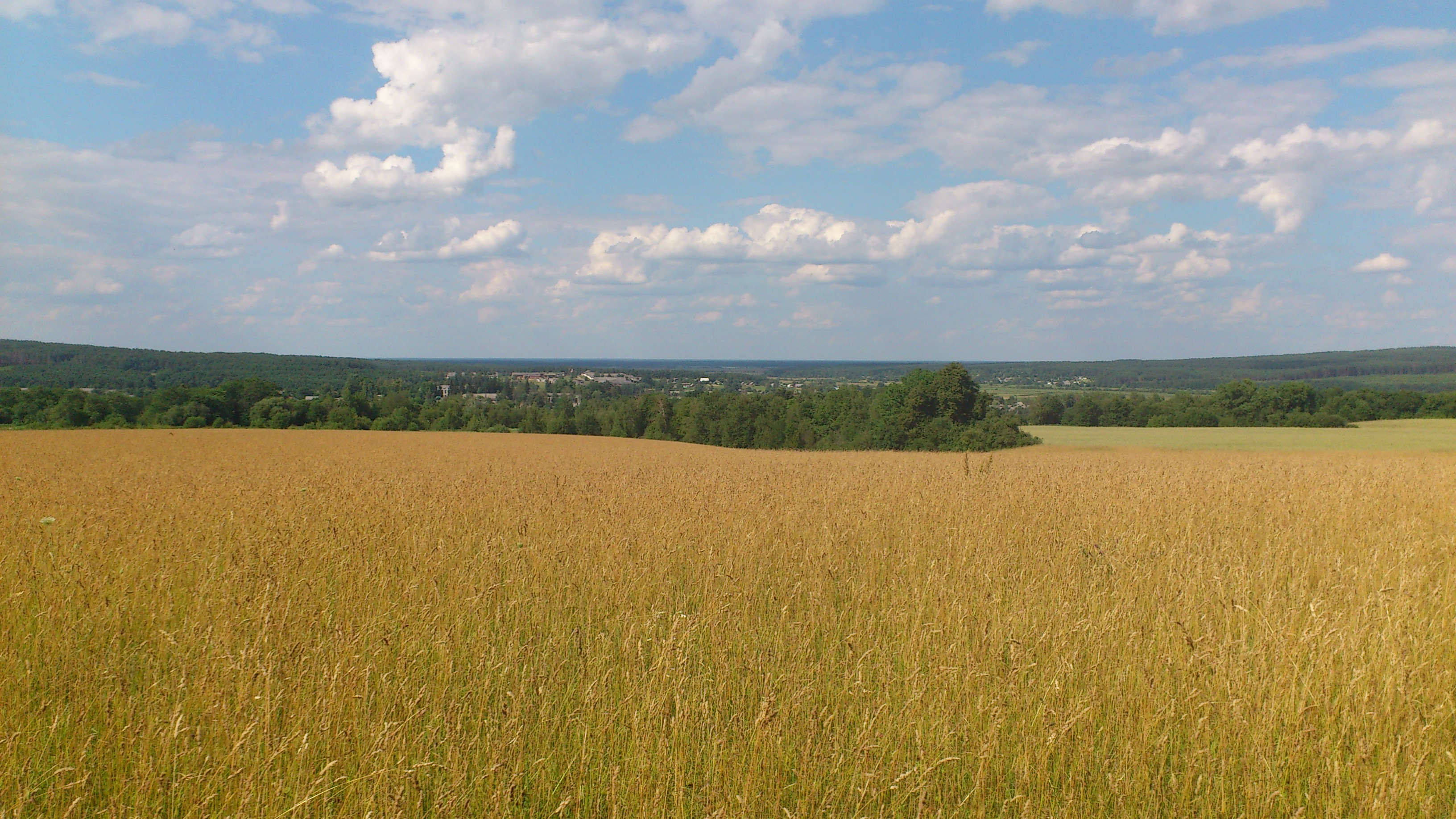 вид на Тхорин